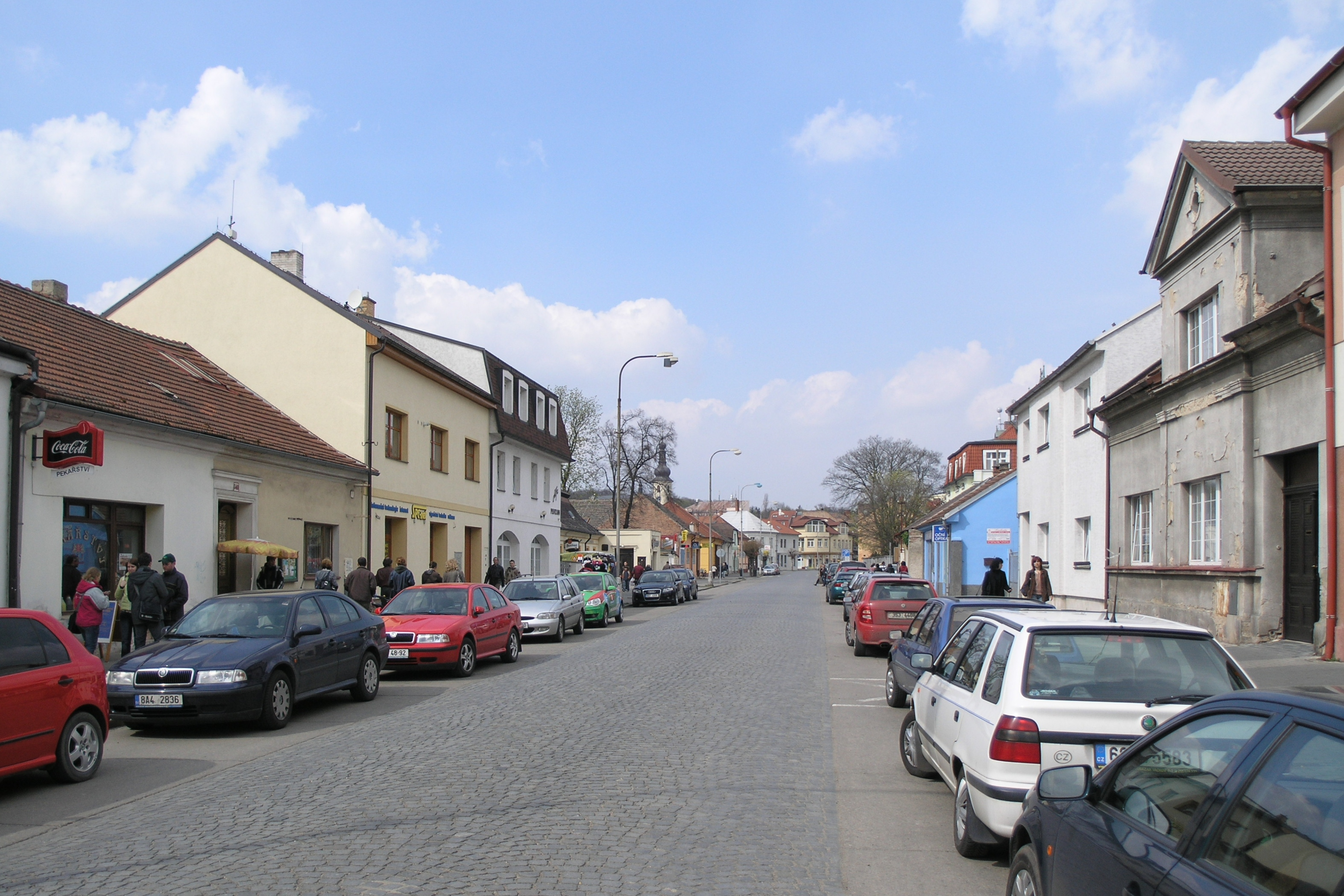 Lysa nad Labem - Masarykova (od nadrazi)